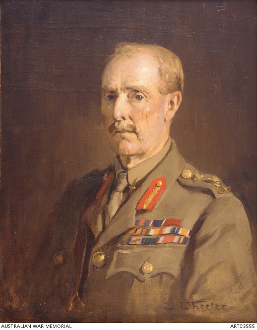 פורטרייט של מייג'ור ג'נרל סר אדוארד צ'ייטור